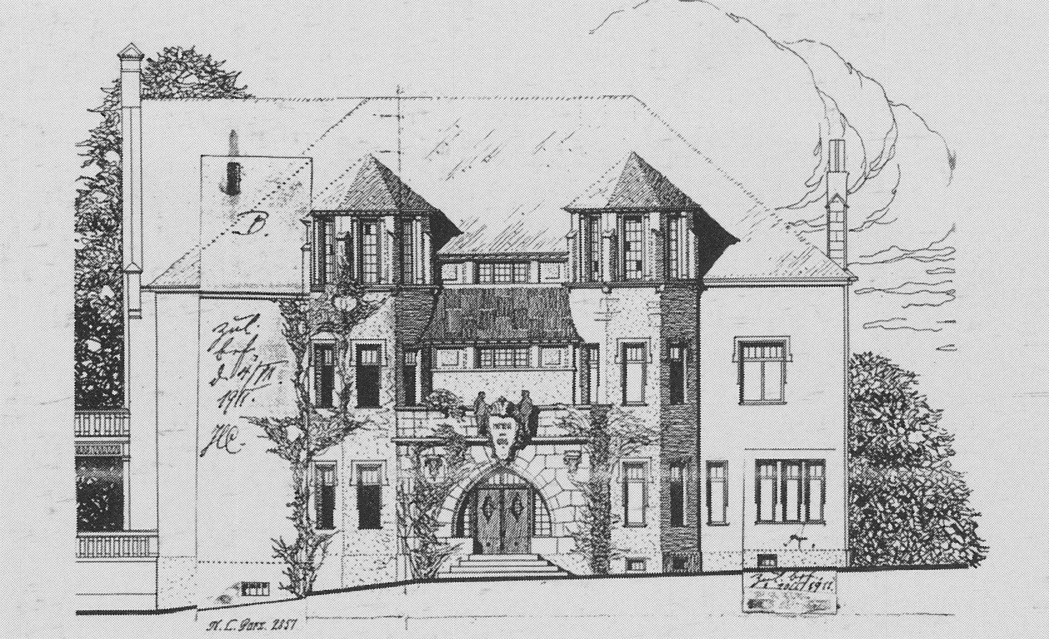 Radebeul Mohrenhaus Bauzeichnung 1910/11